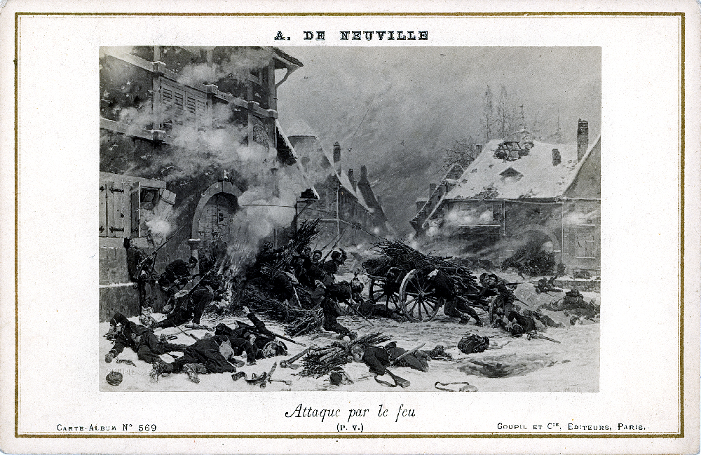 Attaque par le feu de A. De Neuville - Carte album Goupil et CIE éditeur Paris